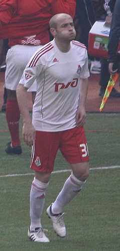 Malhaz Asatiani